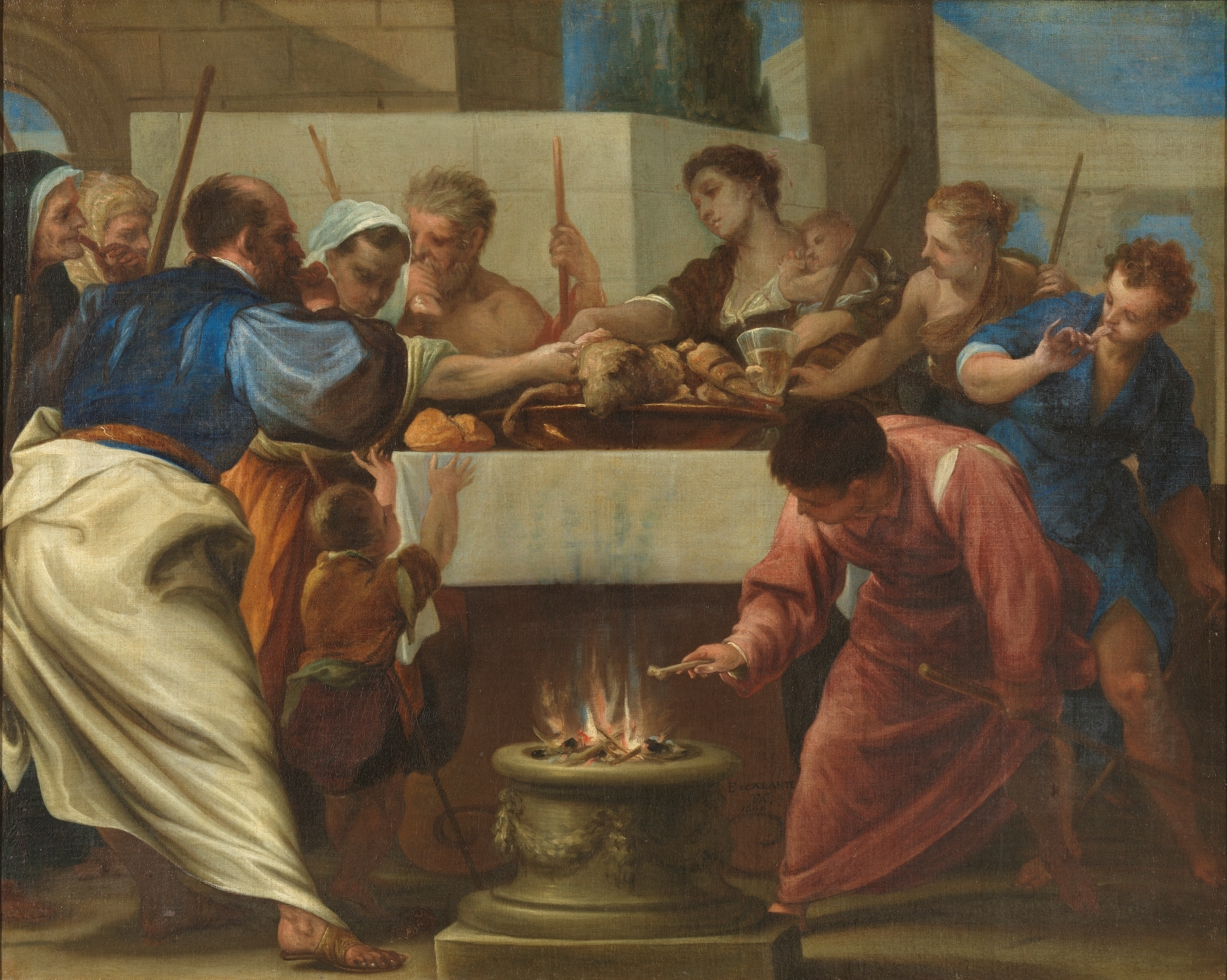 La obra representa a los israelitas celebrando la fiesta de la Pascua judía, que conmemora la salida de los hebreos de Egipto.